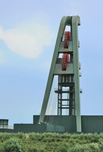 Germany Hamm Födergerüst "Wetterschacht Lerche"